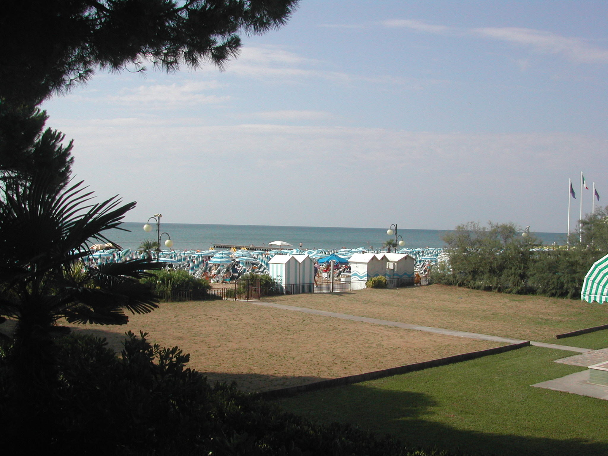 Blick auf dem Strand